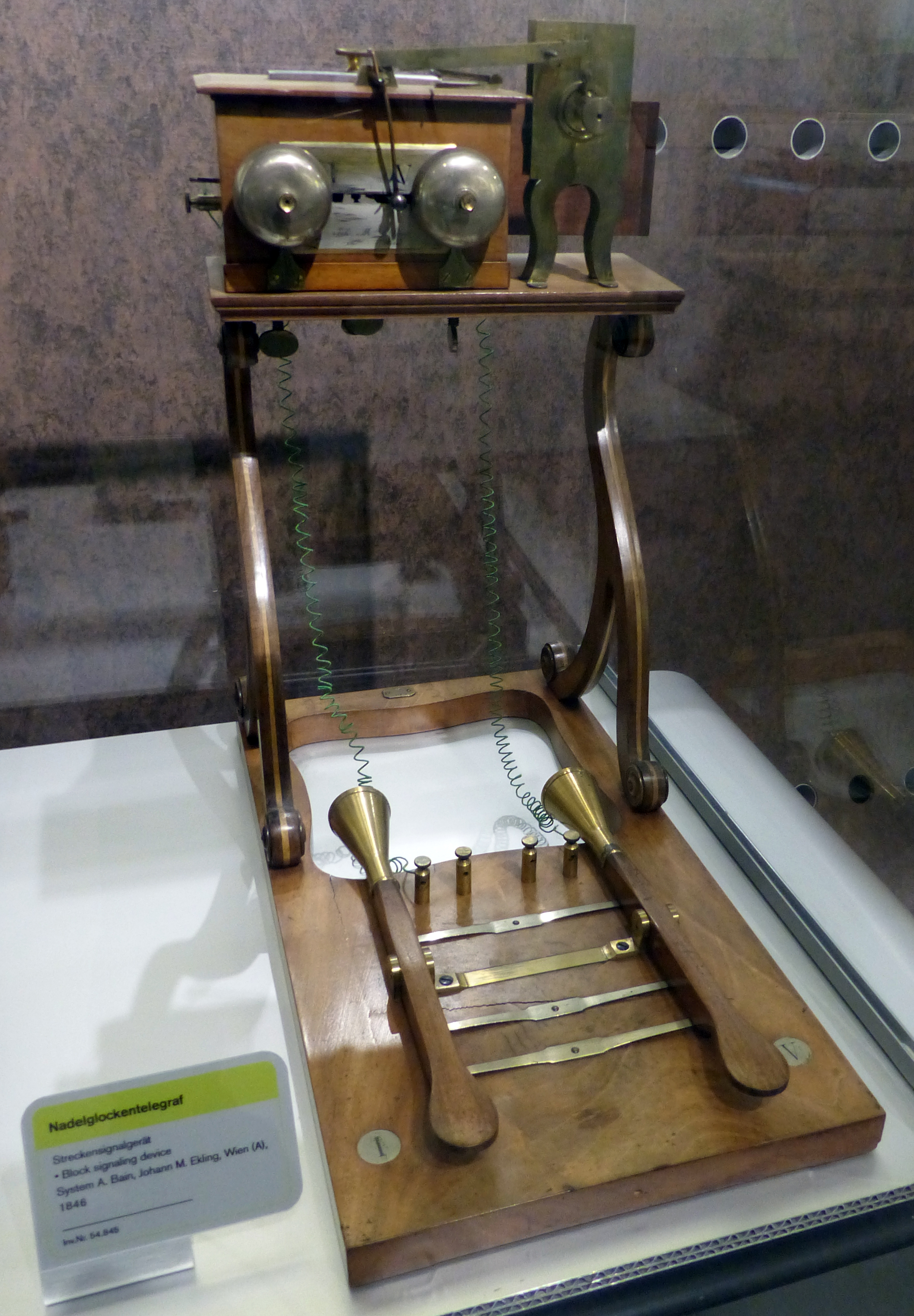 Nadelglockentelegraf (Streckensignalgerät), 1846, System A. Bain, Johann M. Ekling, Wien; Exponat im Technischen Museum Wien